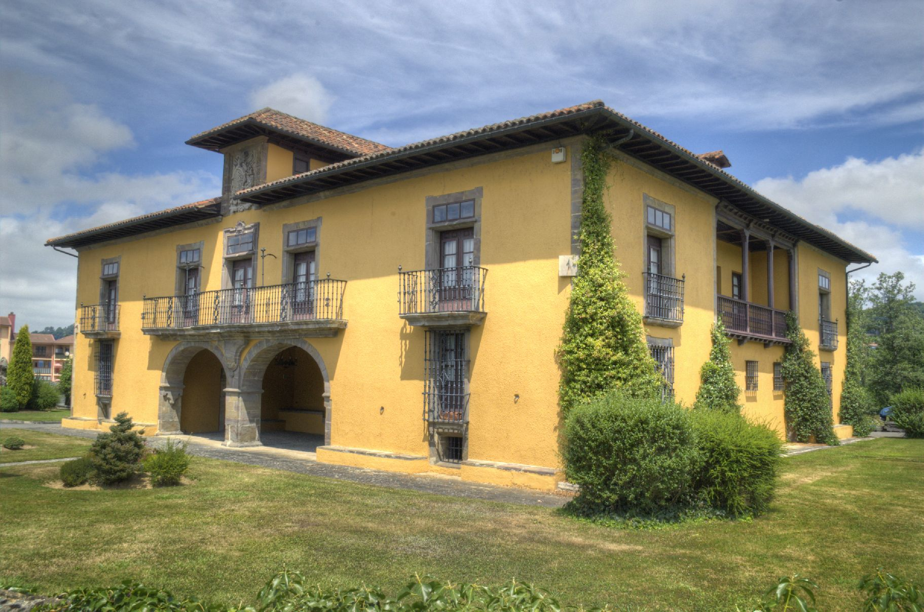 En Lieres (Siero) se alza el Palacio de los Vigil (siglo XVI), luego de Valdés Cavanilles, actualmente bien restaurado. Esta foto muestra la fachada principal y el lado Este.